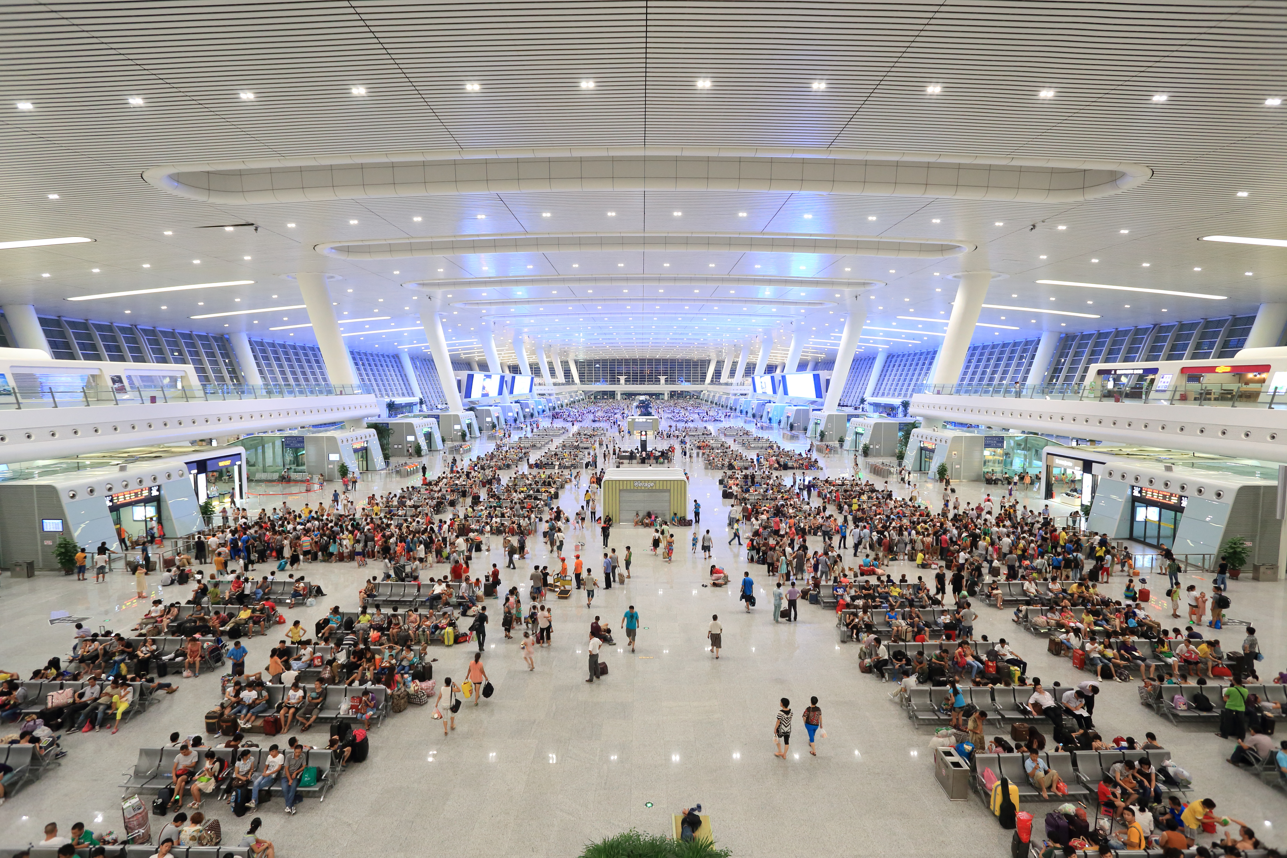 杭州东站候车大厅